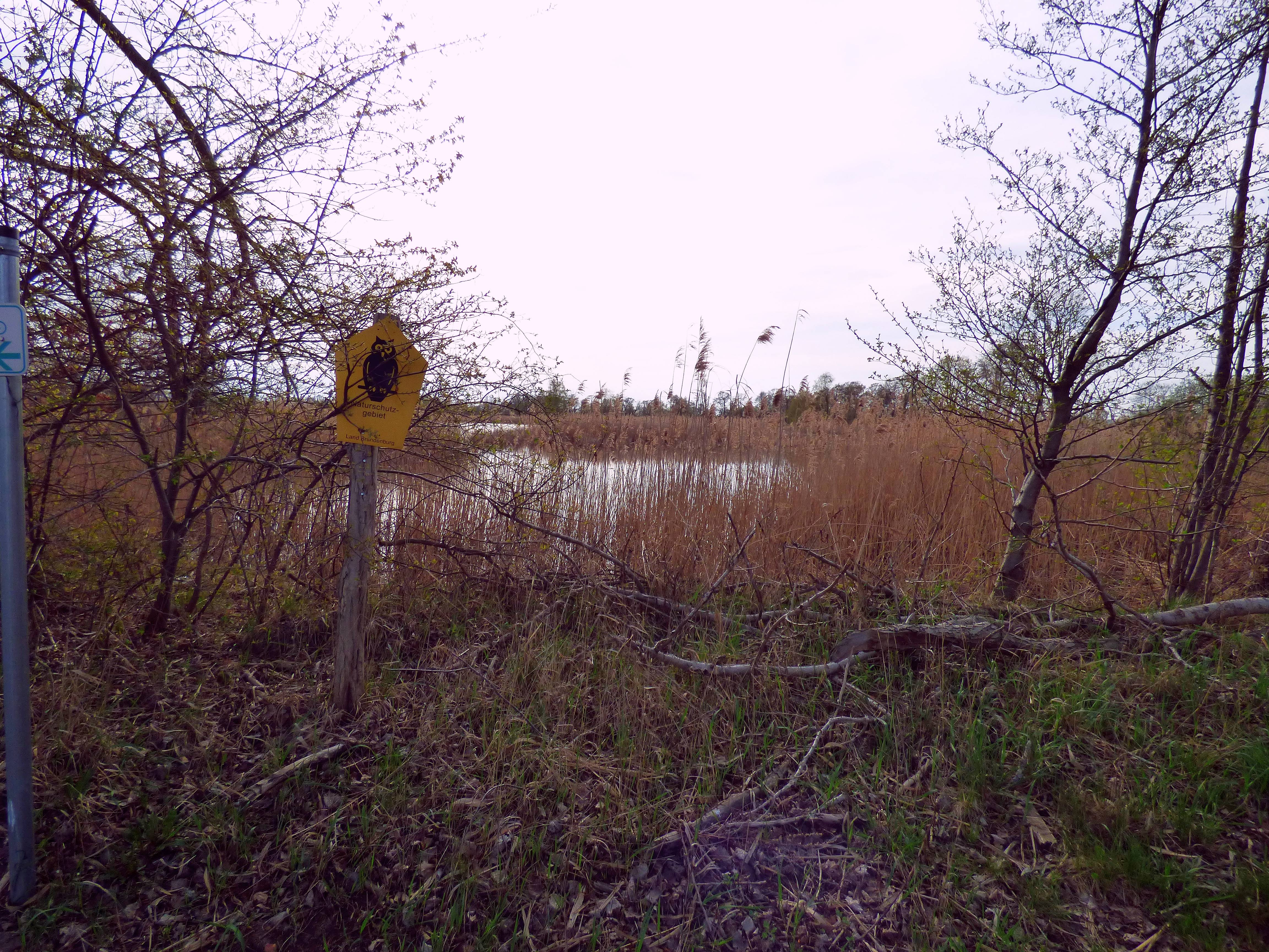 Teiche in Schweinfurth